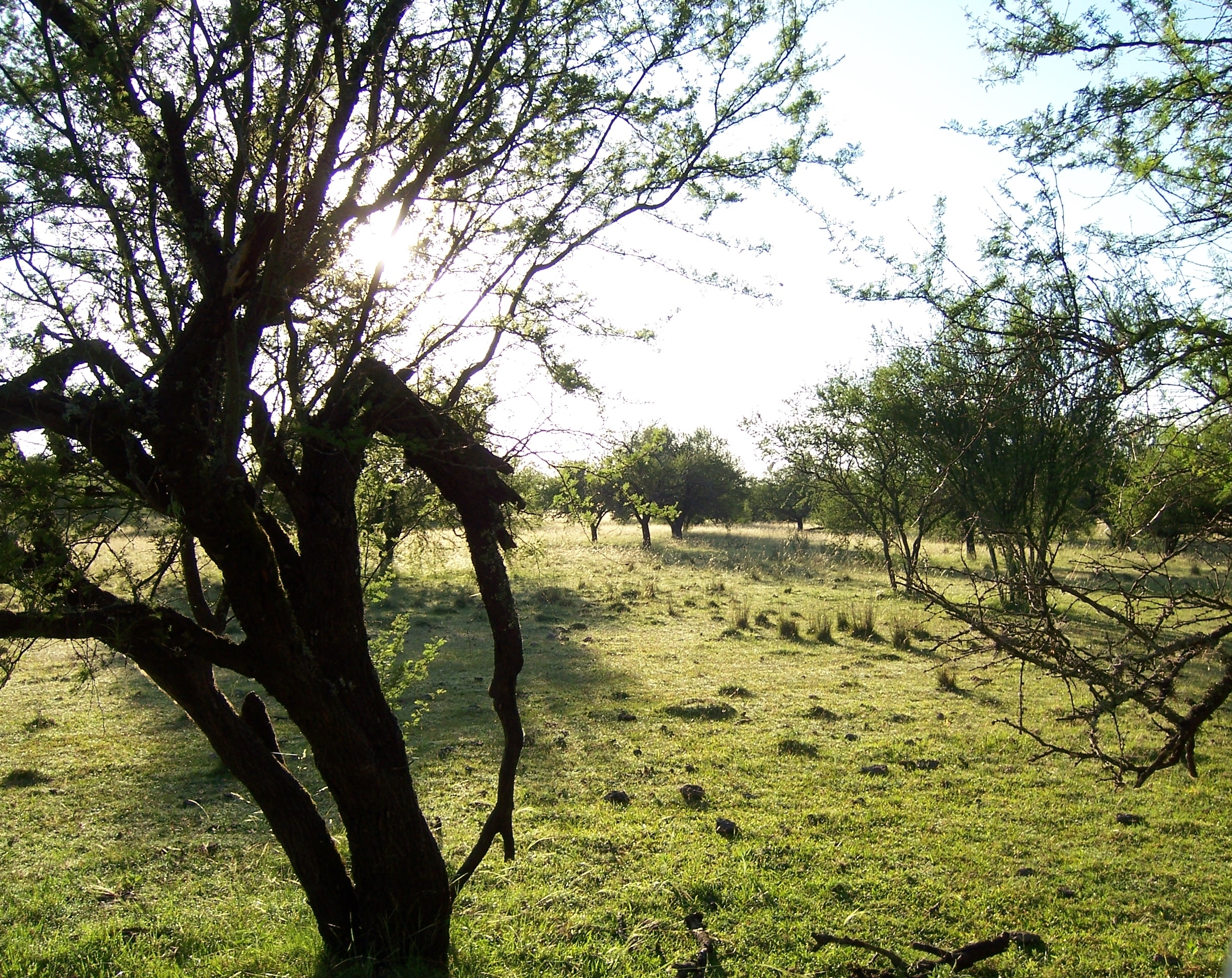 Bosque de parque, Río Queguay. En este tipo de bosque pueden encontrarse árboles de copa abierta, suficientemente espaciados como para ejercer poca competencia entre sí. Entre ellos se puede encontrar abundante vegetación herbácea. Los árboles corresponden a comunidades subxerófitas. Dependiendo de la especie dominante en un monte en particular, se lo puede referir como “algarrobales”, “espinillares”, etc. En la imagen, se trata de espinillos (Acacia caven).